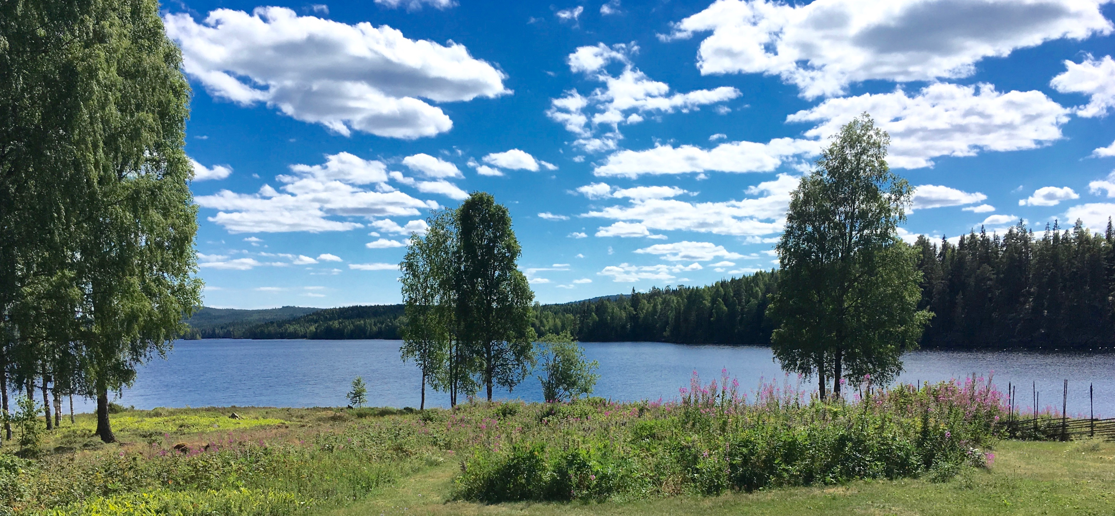 Utsikt mot Vägsjön från Edbergs sommarhus i Vägsjöfors